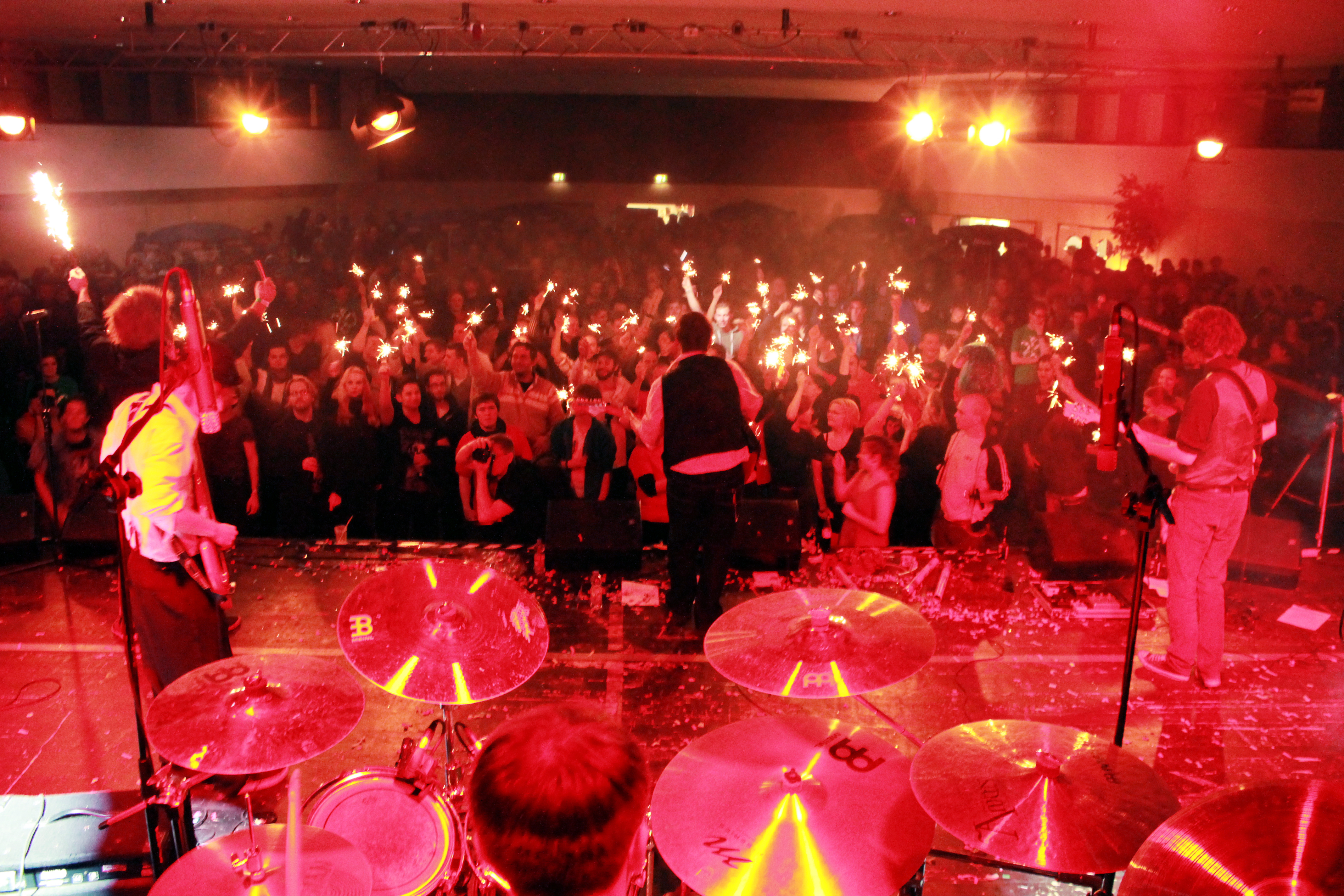 Die Gribaldies